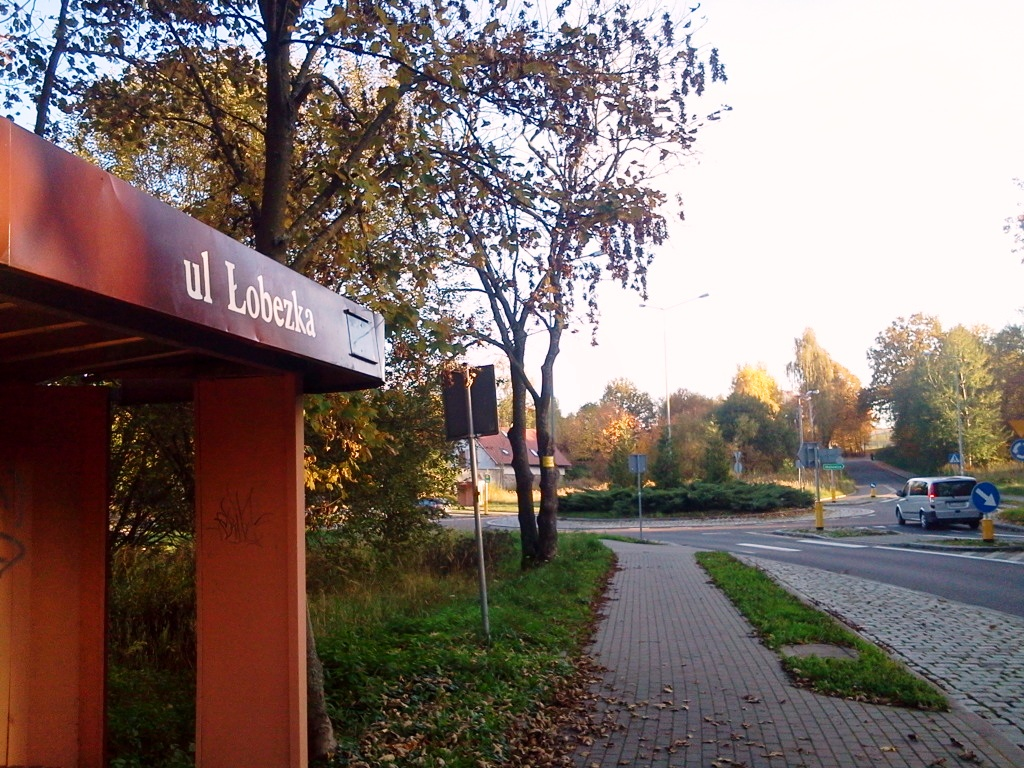 Ulica Łobezka w Płotach